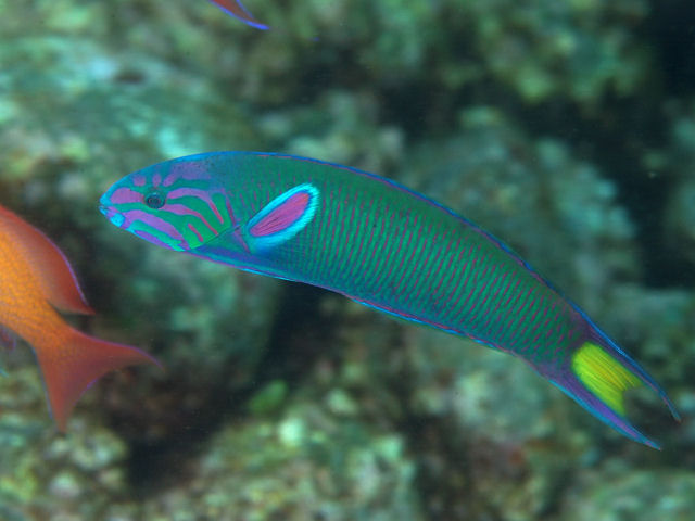 オトメベラ Thalassoma lunare